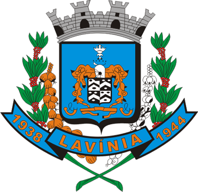 Basão de Lavínia